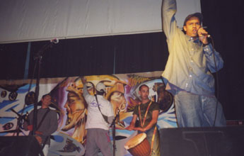 international free style aux rencontres urbaines à fréjus hip hop culture